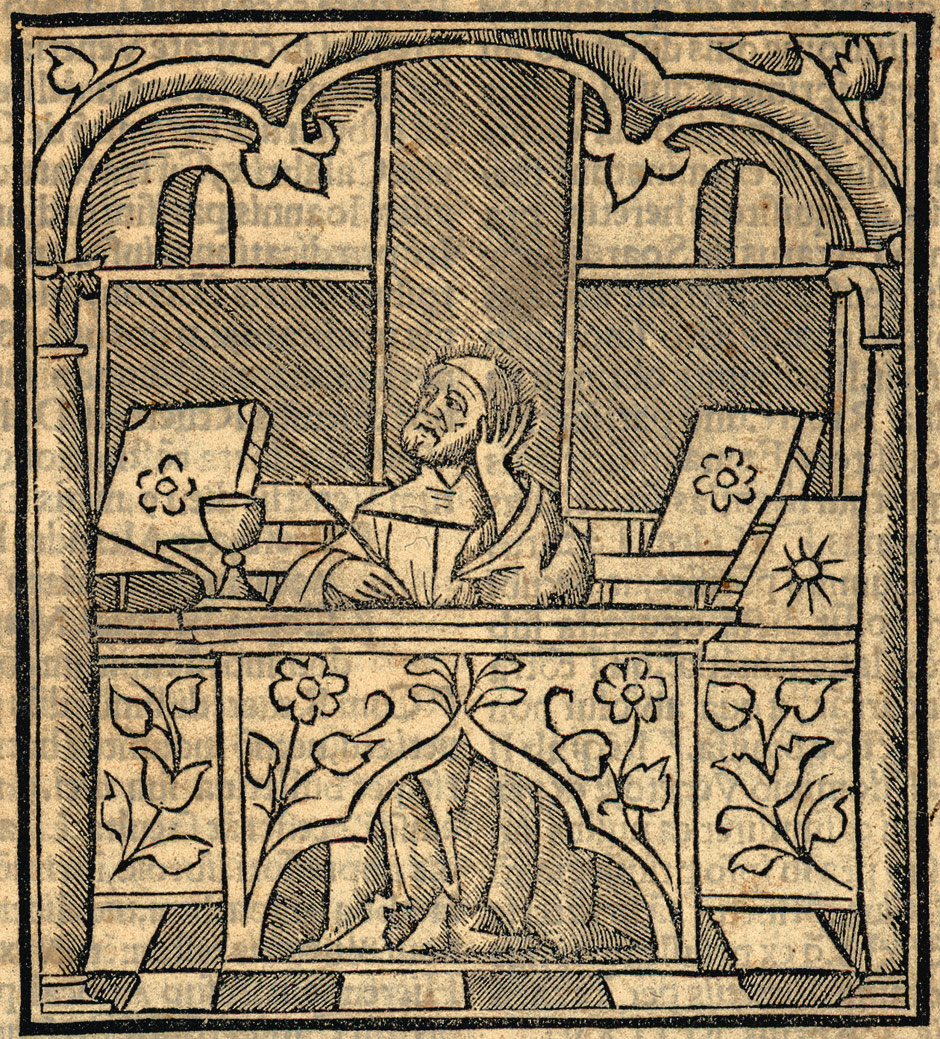 „Joachim in seinem Studierzimmer“, Holzschnitt aus: Joachim von Fiore: Expositio in librum Cirilli de magnis tribulationibus & statu sancte matris ecclesie cum compilatione Theolosphori de Cusentia (u. a. Schriften), Venedig, B. Benali, (1516)